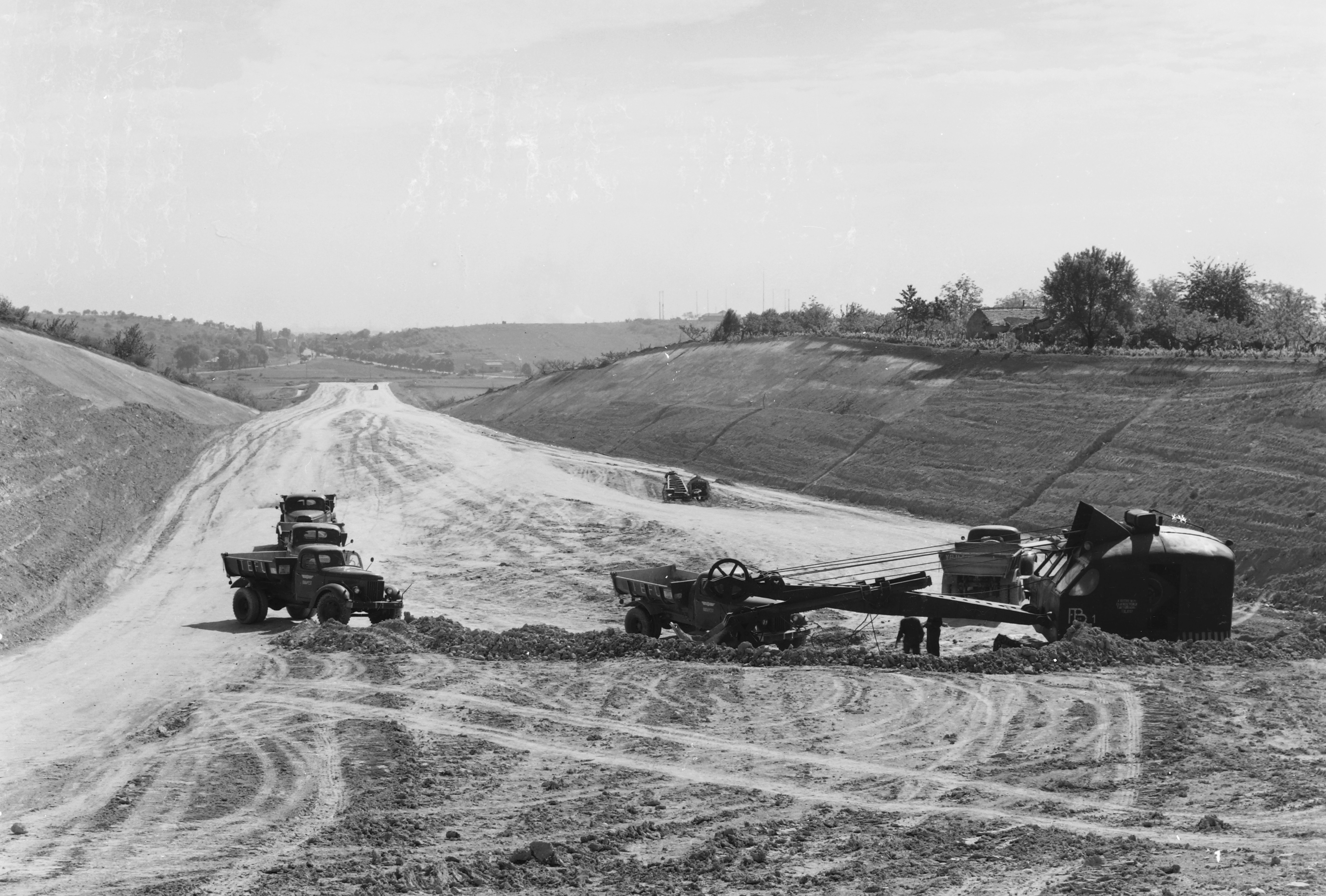 az M1-M7 autópálya közös szakasza a mai Egér út irányából a város felé nézve. Location: Hungary, Budapest XI. Tags: excavator, commercial vehicle, road construction, Budapest Title: az M1-M7 autópálya közös szakasza a mai Egér út irányából a város felé nézve.